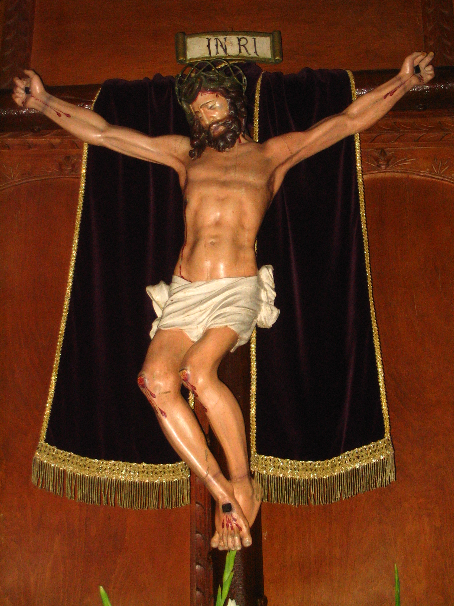 Sto. Cristo de las Batallas (s. XVII-XVIII), Macotera